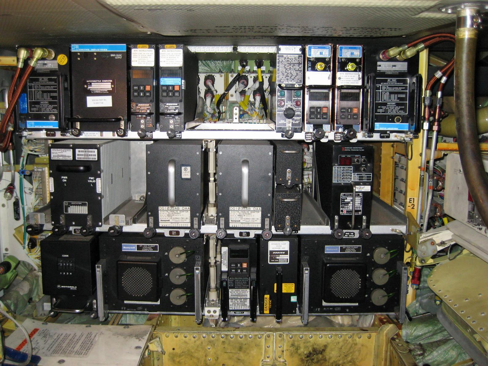 Electrical & Electronic Compartment (E1 Rack) of aircraft Boeing-737-500 UR-VVQ ( MSN 29235), AeroSvit Airlines